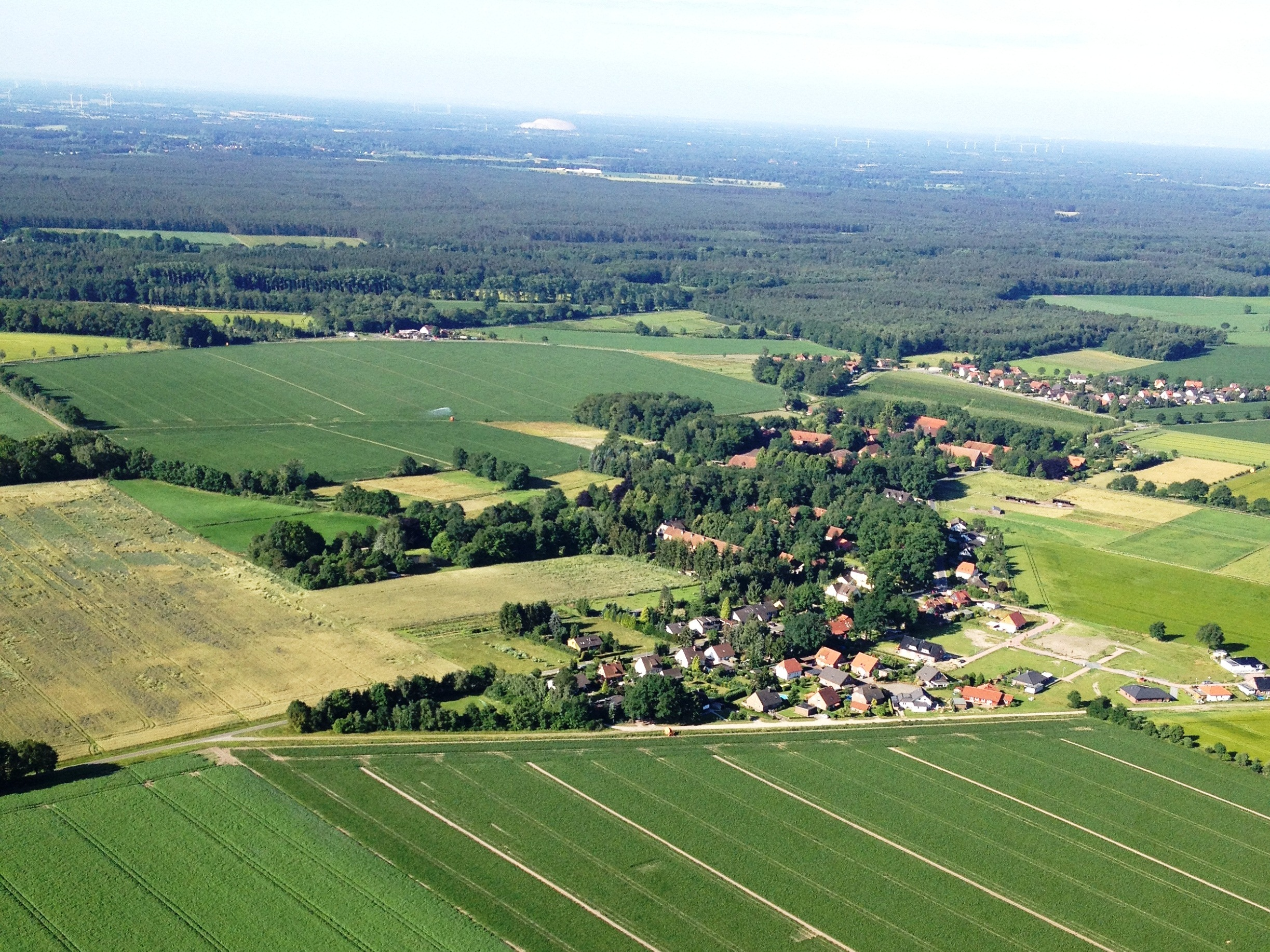 Blick auf Gockenholz von NO aus